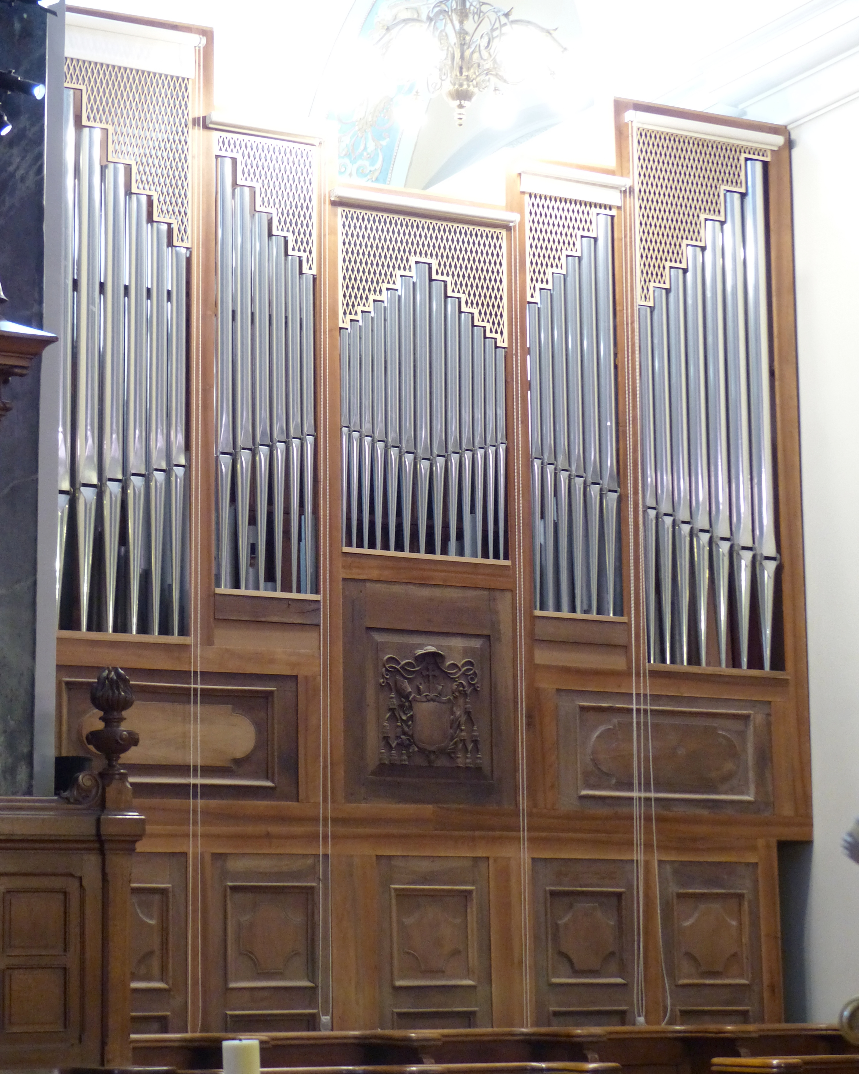 Nice (Alpes-Maritimes, France), cathédrale Ste Réparate, dans l'abside médiane, l'orgue de chœur reconstruit en 2007 par Delangue de Nice avec une façade et une Montre neuves et réutilisation d'éléments de l’instrument précédent du niçois Florentin Martella.